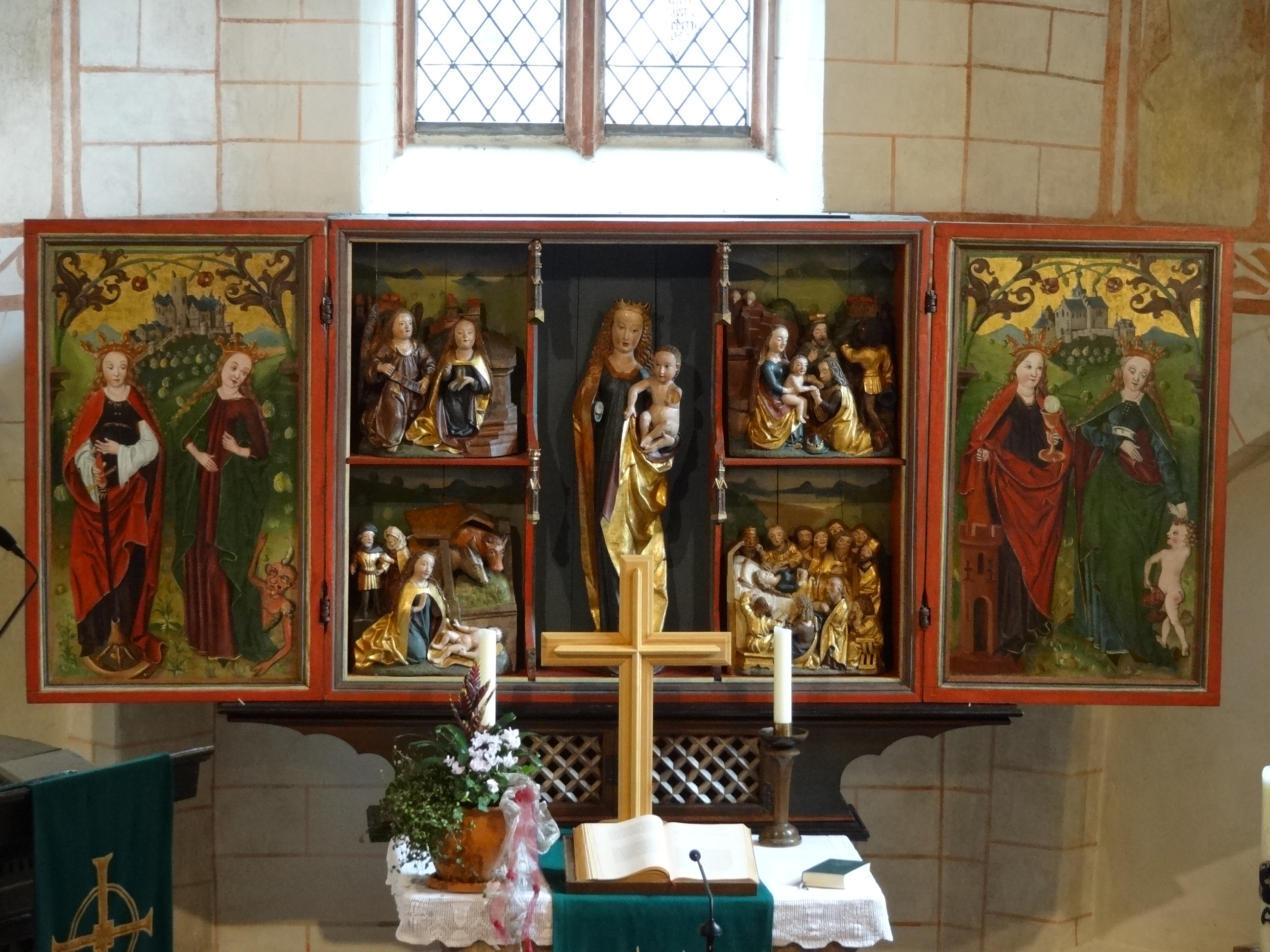 Evangelische Kirche (Heuchelheim, Hessen)